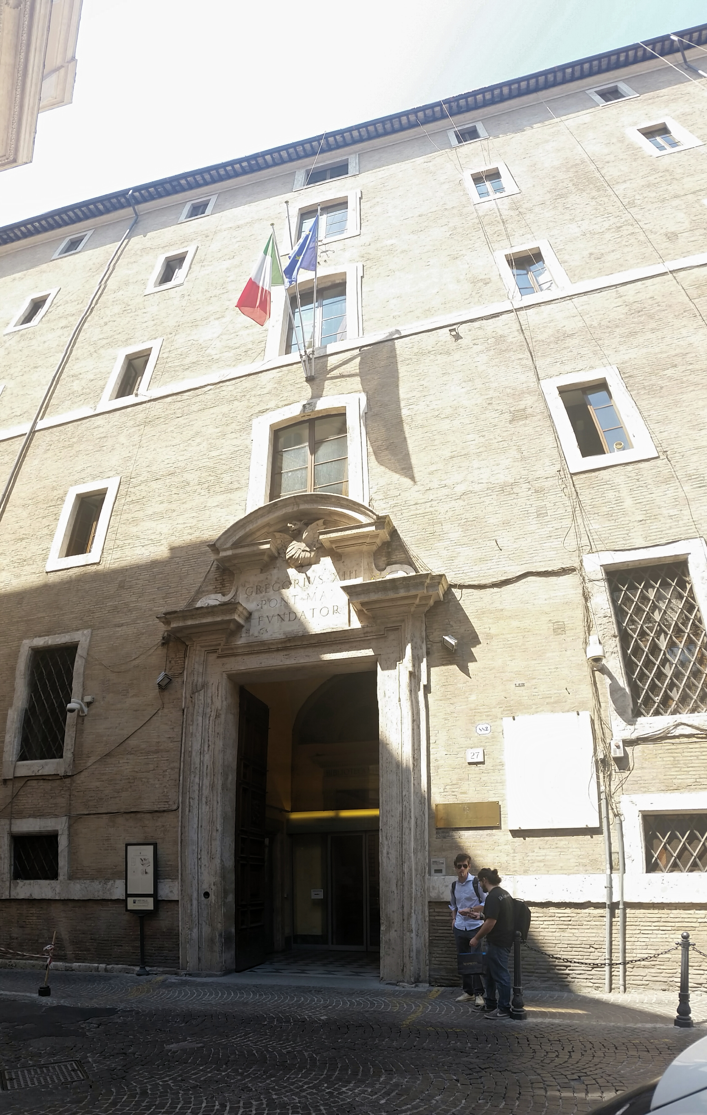 Sede Ministero dei beni e delle attività culturali e del turismo. MIBACT. Roma Collegio Romano